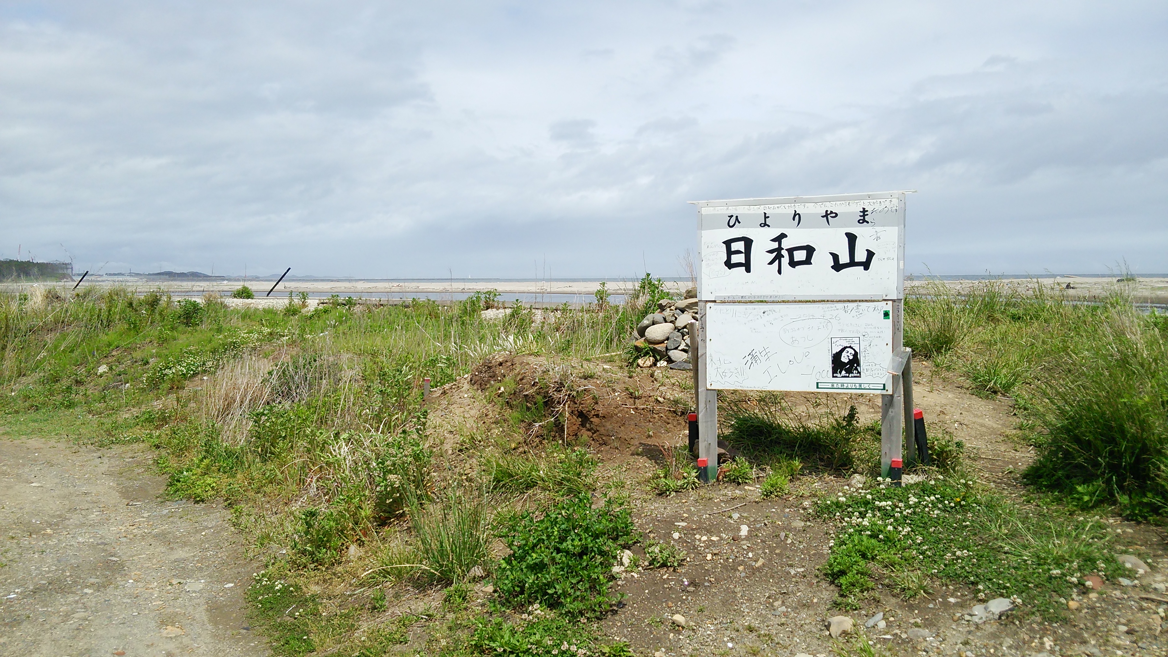 被災後の日和山